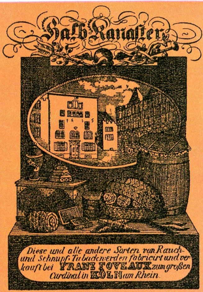 Signet Tabaksorte Halbkanaster